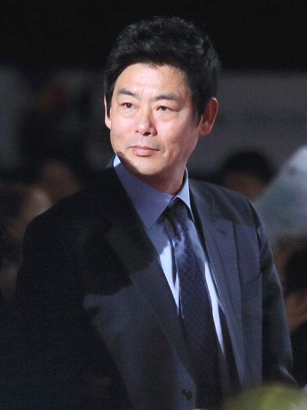 151001 부산국제영화제 개막식 레드카펫